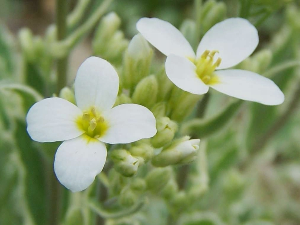 Arabis caucasica (pl. gęsiówka kaukaska)